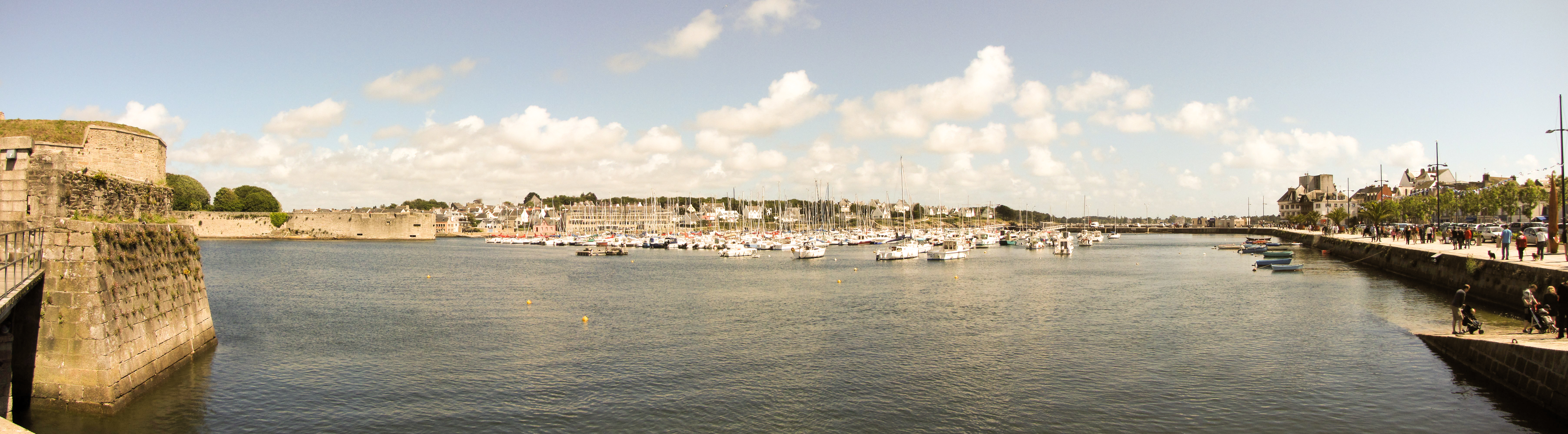 Concarneau - ¨Port de plaisance 2